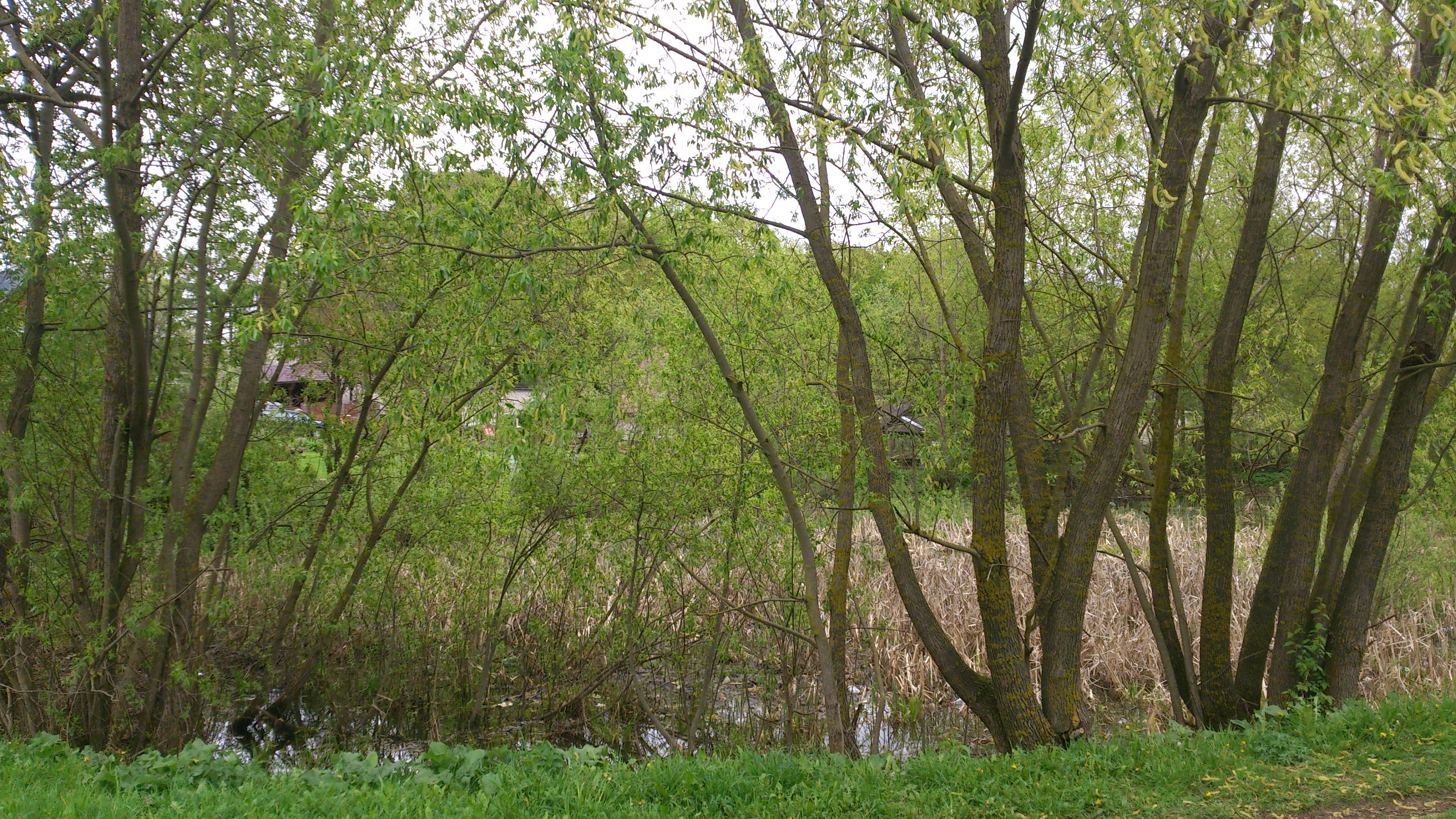 Peetri tiik Tartus, 14. mai 2014